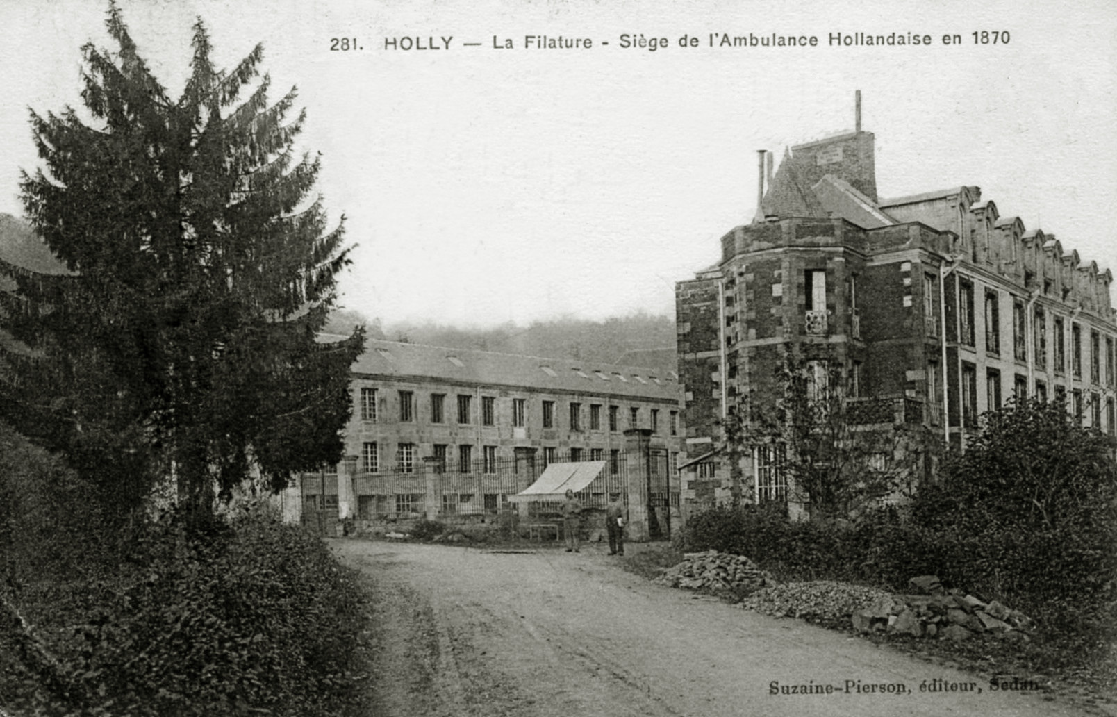 Carte postale. Le château d'Olly au début du XIXe sciècle, alors Filature